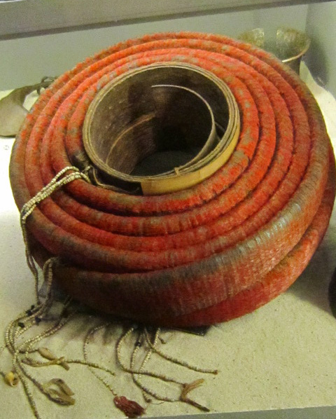 Bilden visar ett fjädermynt från Melanesien.